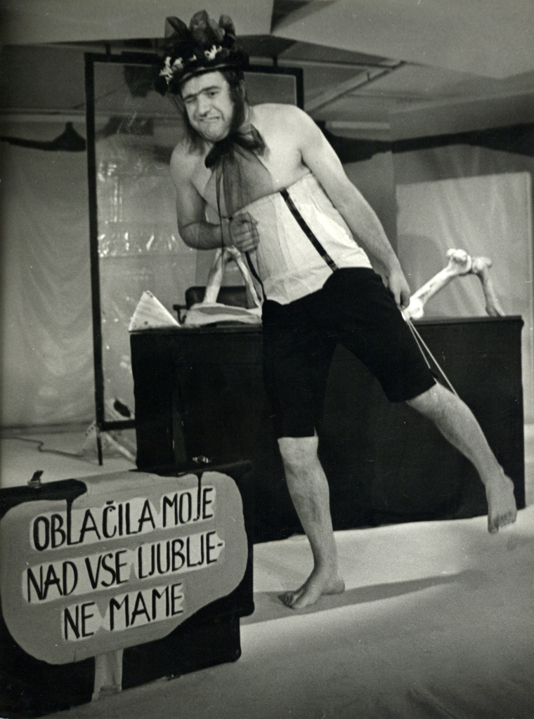 Fernando Arrabal, Arhitekt in asirski cesar, Drama SNG v Ljubljani. Na fotografiji: Janez Hočevar (Arhitekt).